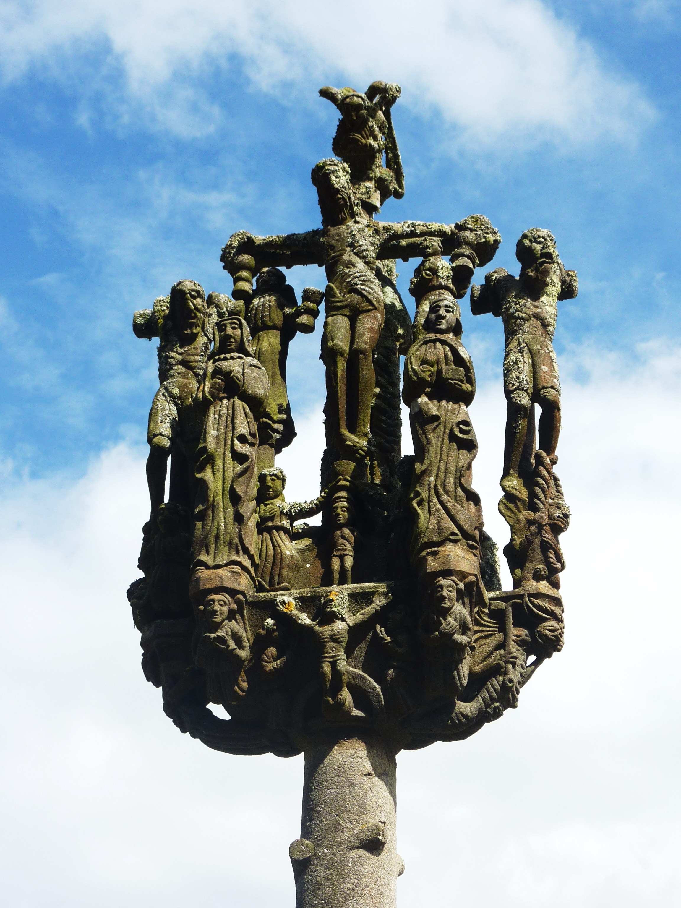 Saint-Herbot (Plonévez-du-Faou): détail du calvaire